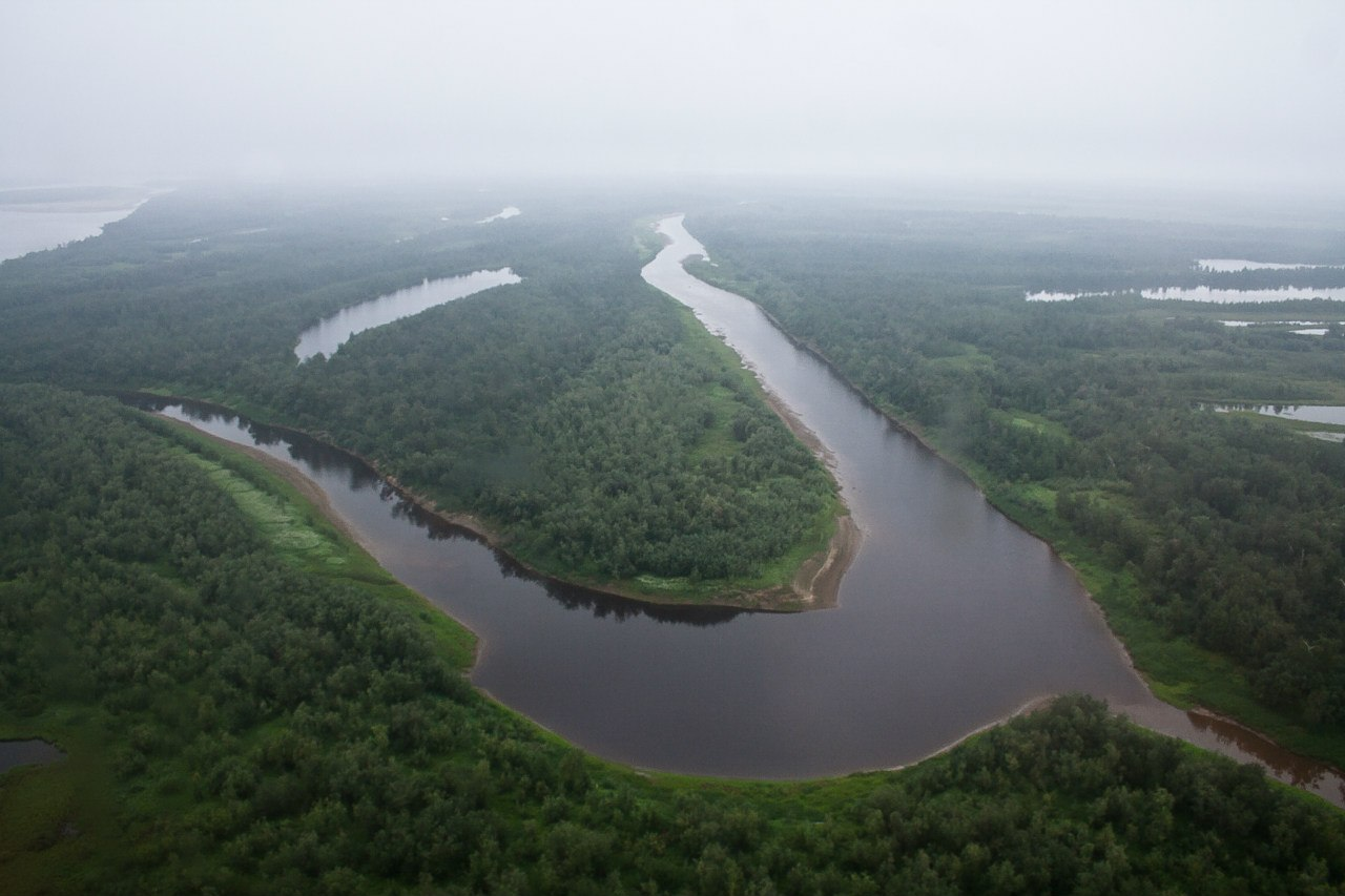 Туруханский заказник, Туруханский район This image is related to the protected area of Russia number 2410186